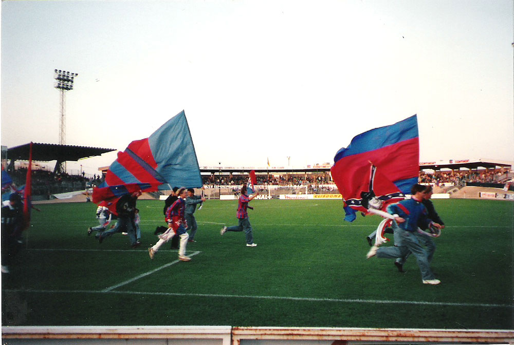 ambiance dans le stade de Venoix avant le match Caen Saragosse le 15 septembre 1992